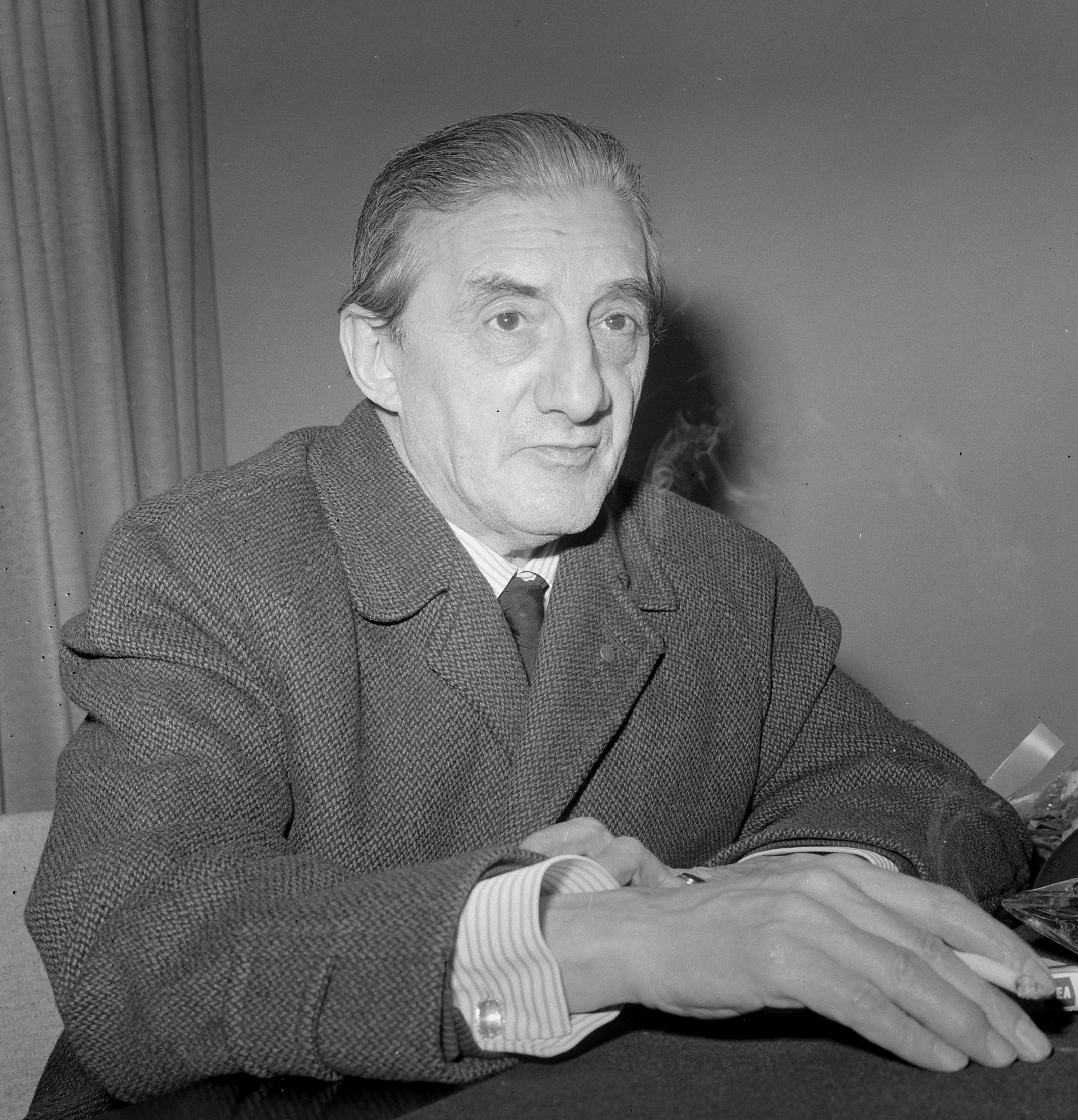 Aankomst Sir John Barbirolli (dirigent) op Schiphol 14 september 1965